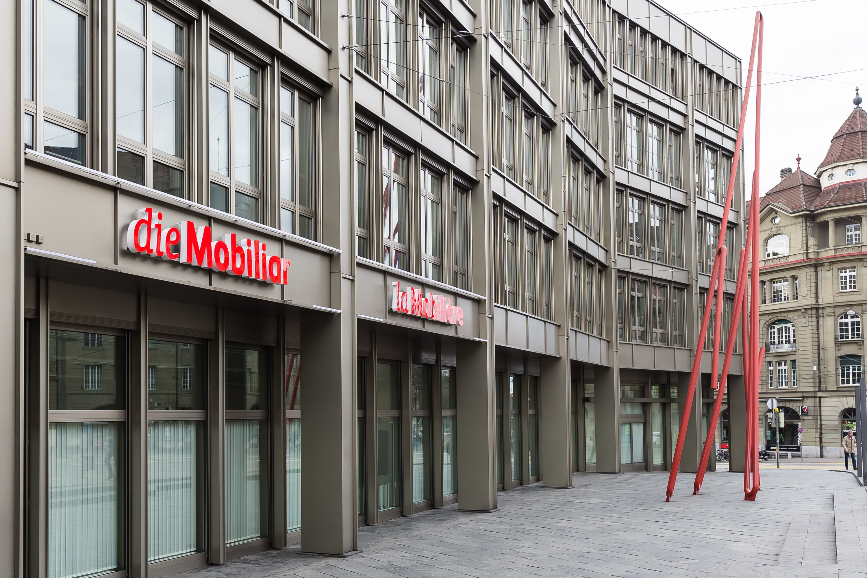 Die Mobiliar Haupsitz, davor Stahlrohrplastik Grosser Chribel von 1986 vom Berner Künstler Ueli Berger (1937–2008) an der Bundesgasse 35 in Bern in der Schweiz